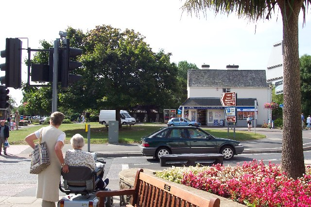 Braunton village centre